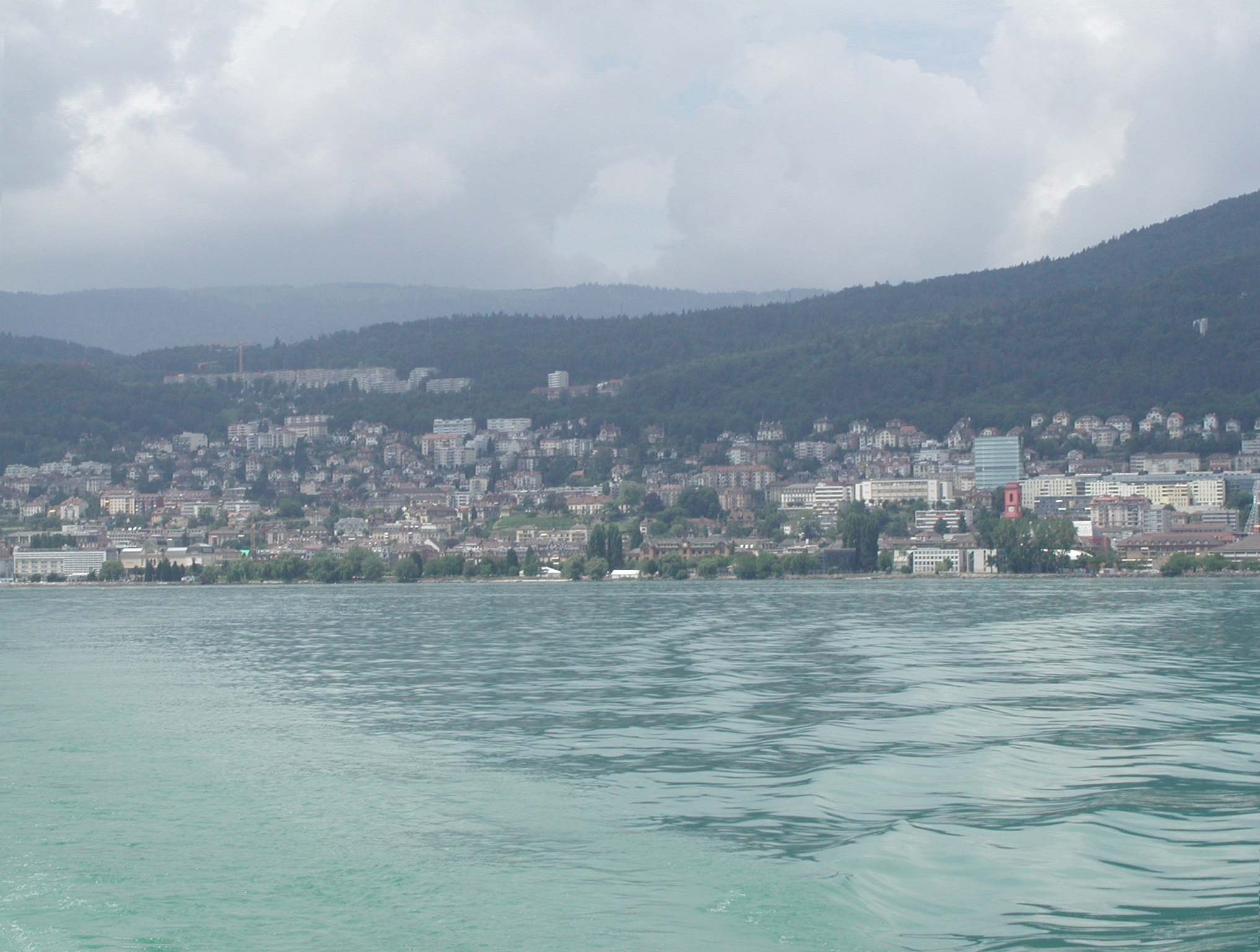 Neuchâtel (NE), Suisse; Vue du lac